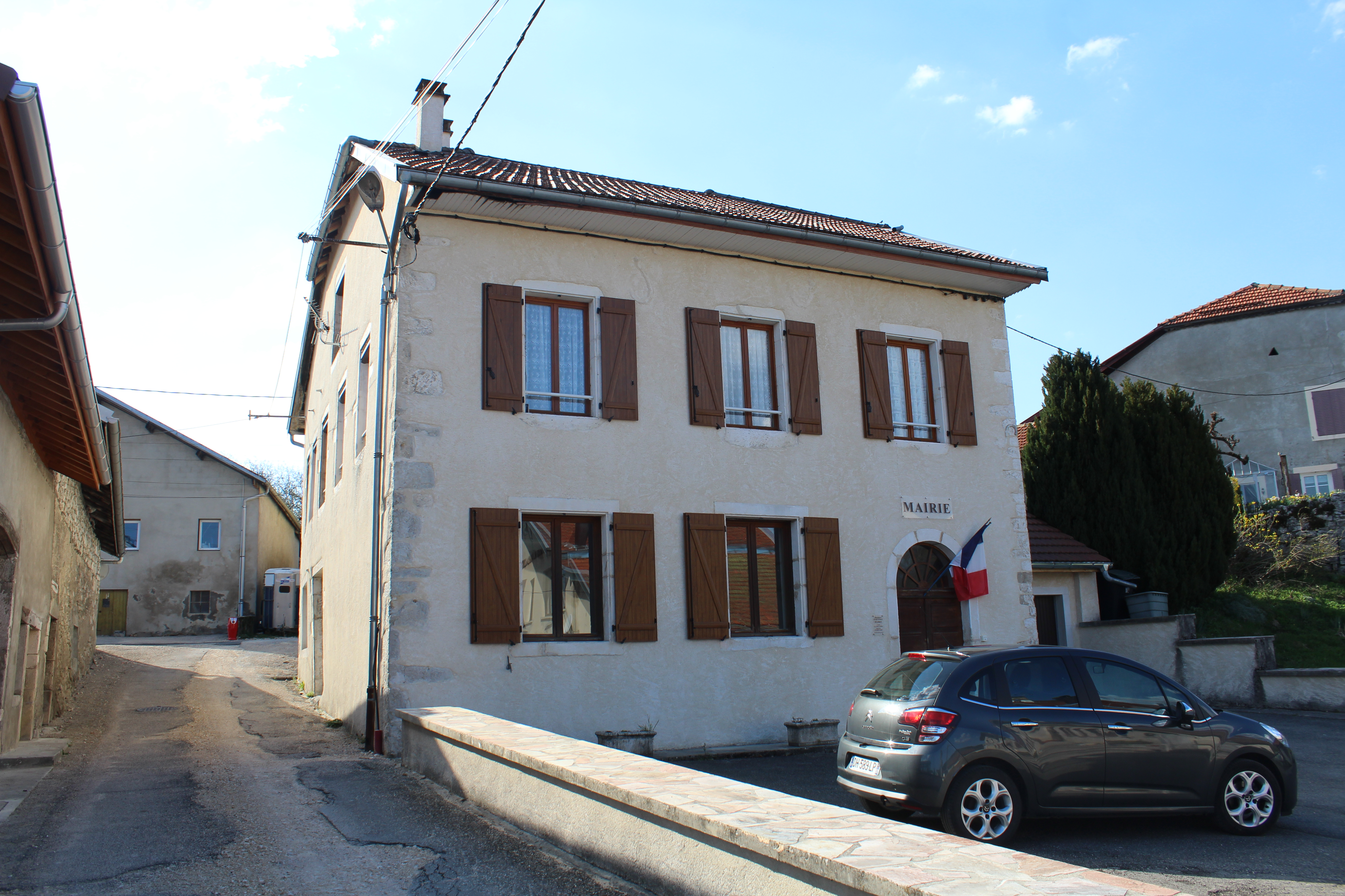 Mairie de Plagne, Ain.